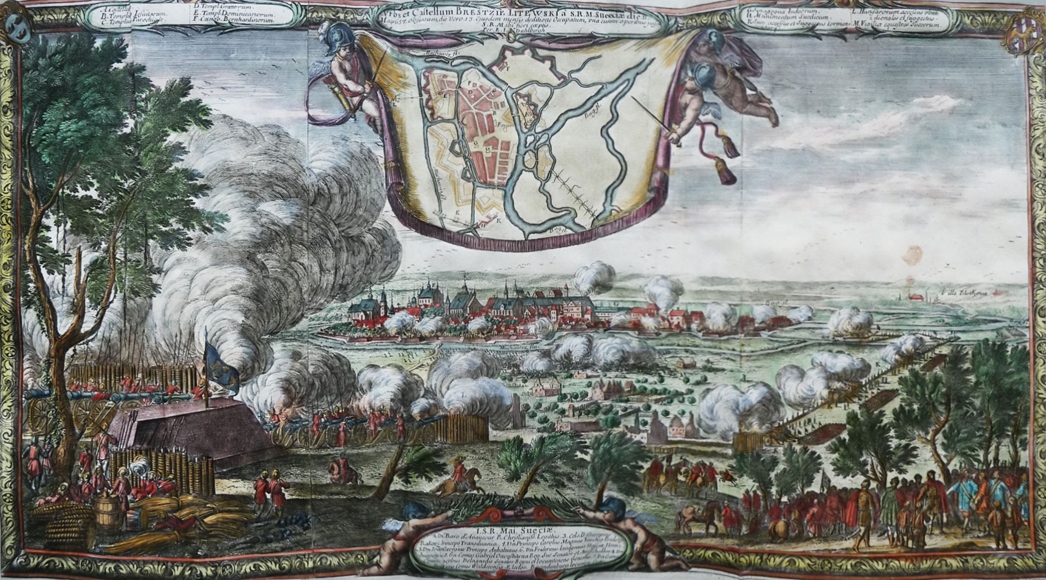 Беларуская (тарашкевіца): Аблога Берасьця Літоўскага ў вайну Швэцыі з Рэччу Паспалітай, 1657